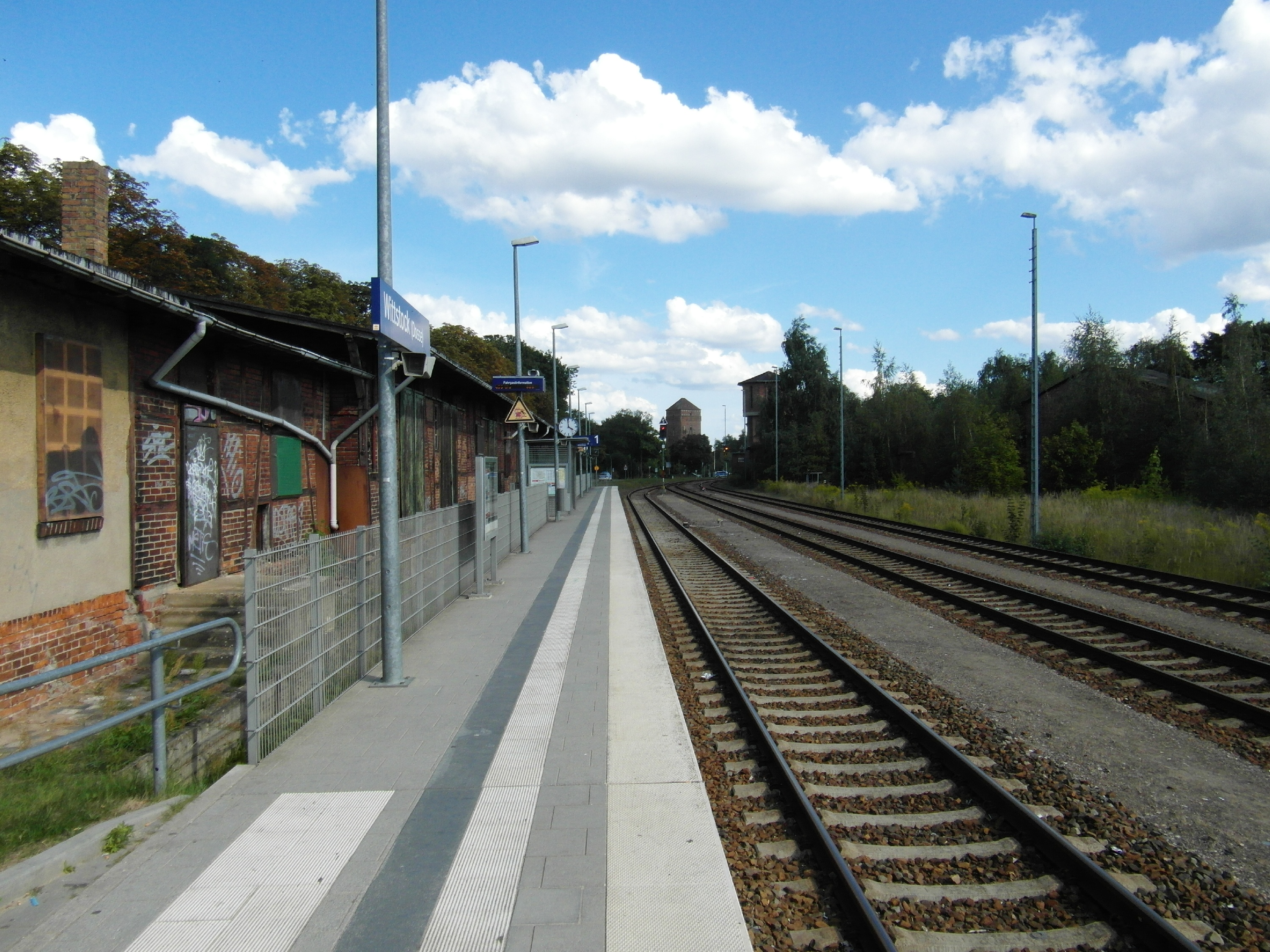 Bahnhof Wittstock im Landkreis Ostprignitz-Ruppin in Brandenburg